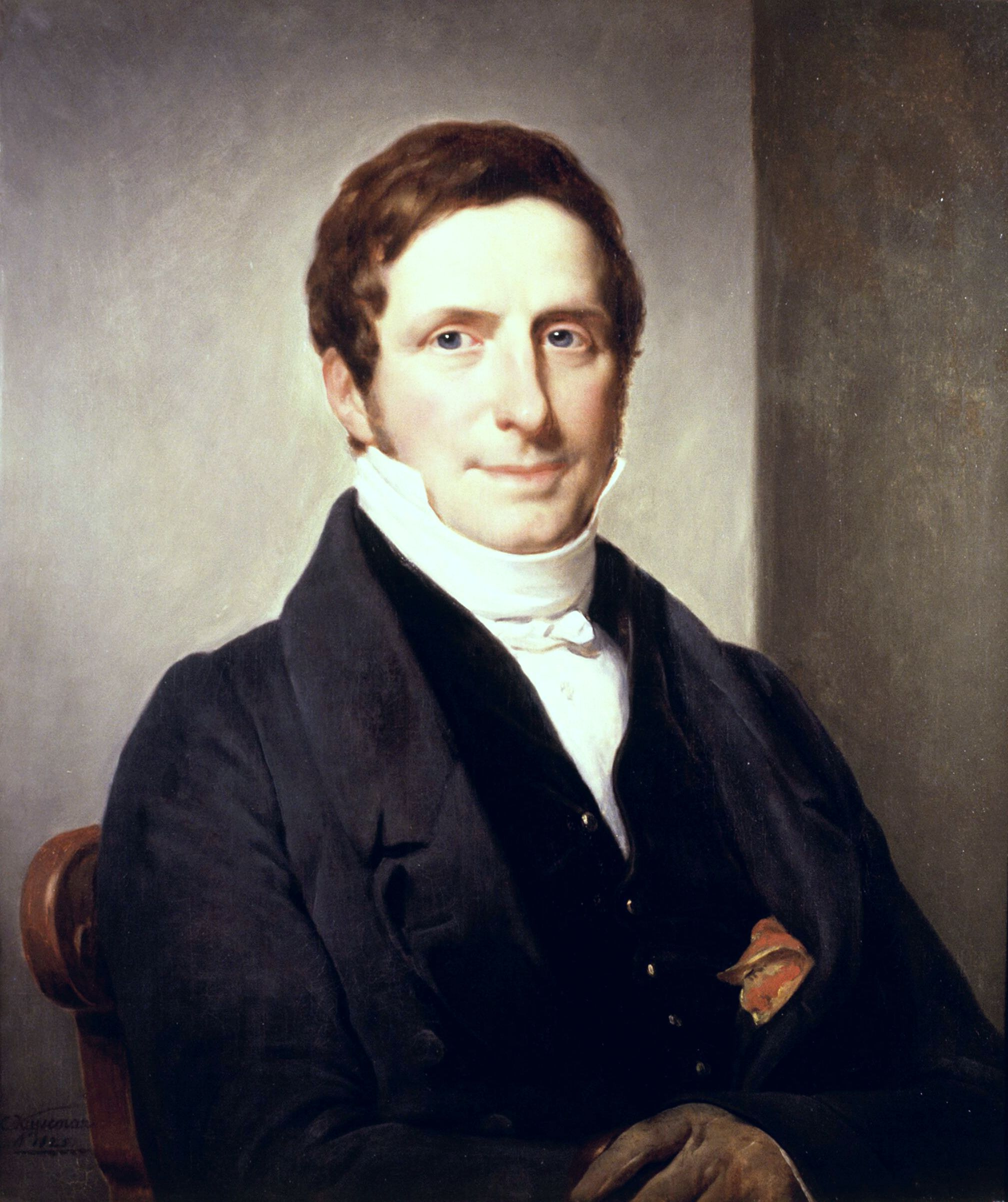 Jhr. D.F. van Alphen